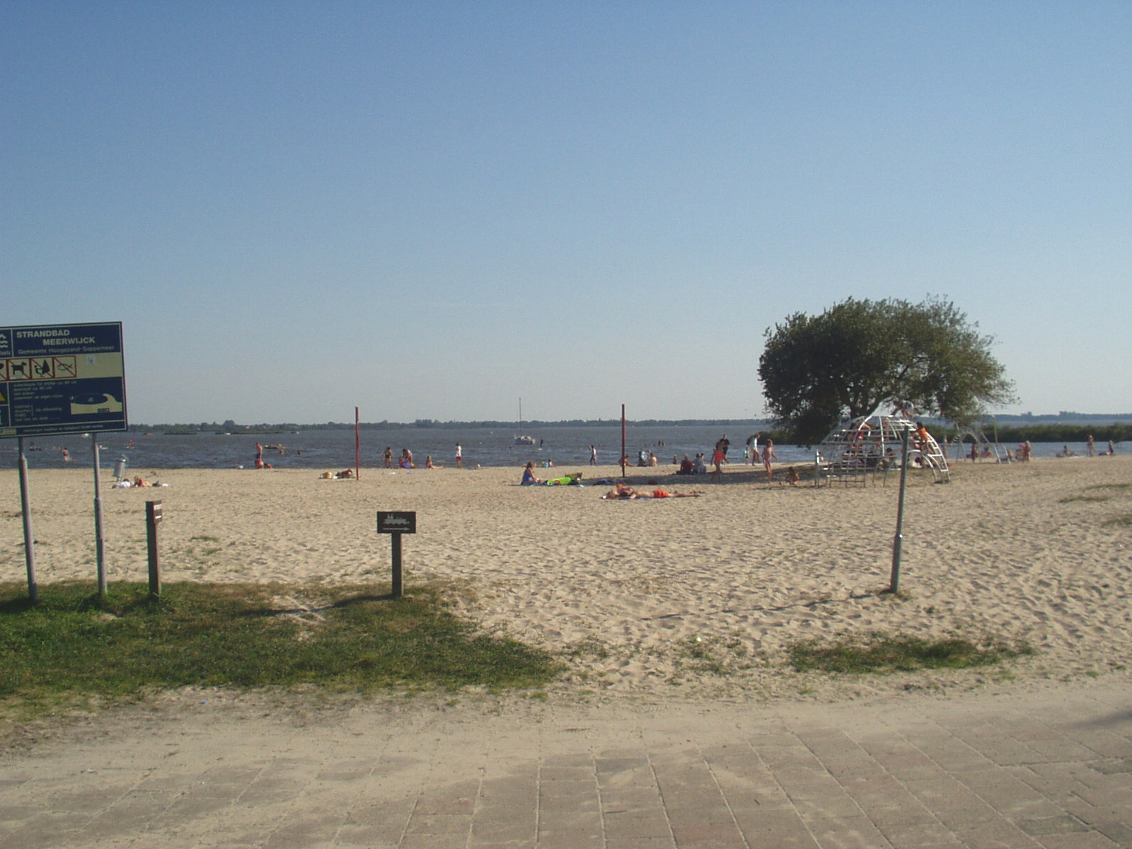 Zuidlaardermeer